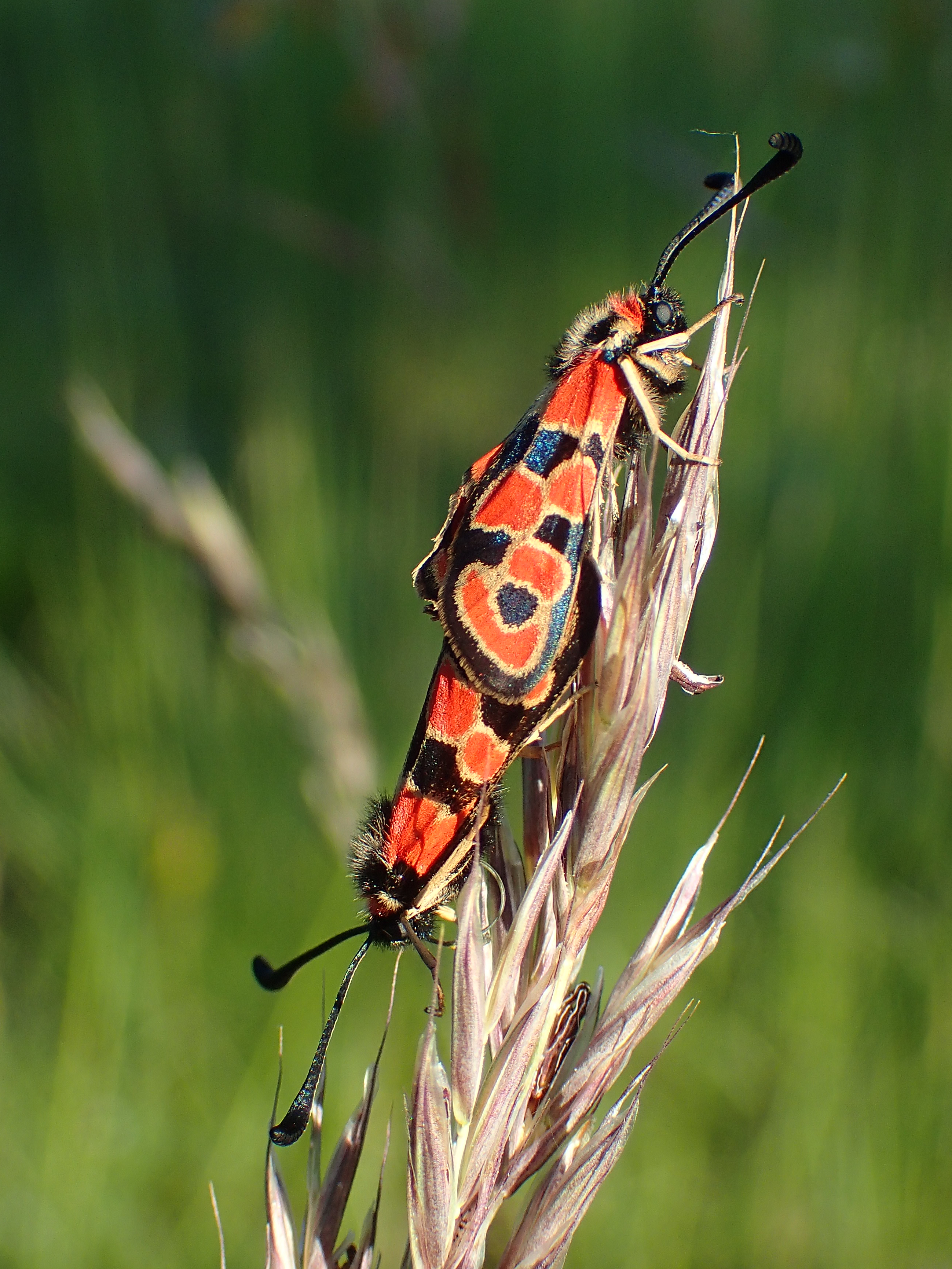 Zygaena fausta (Zygène de la petite Coronille) en accouplement, Aveyron, France